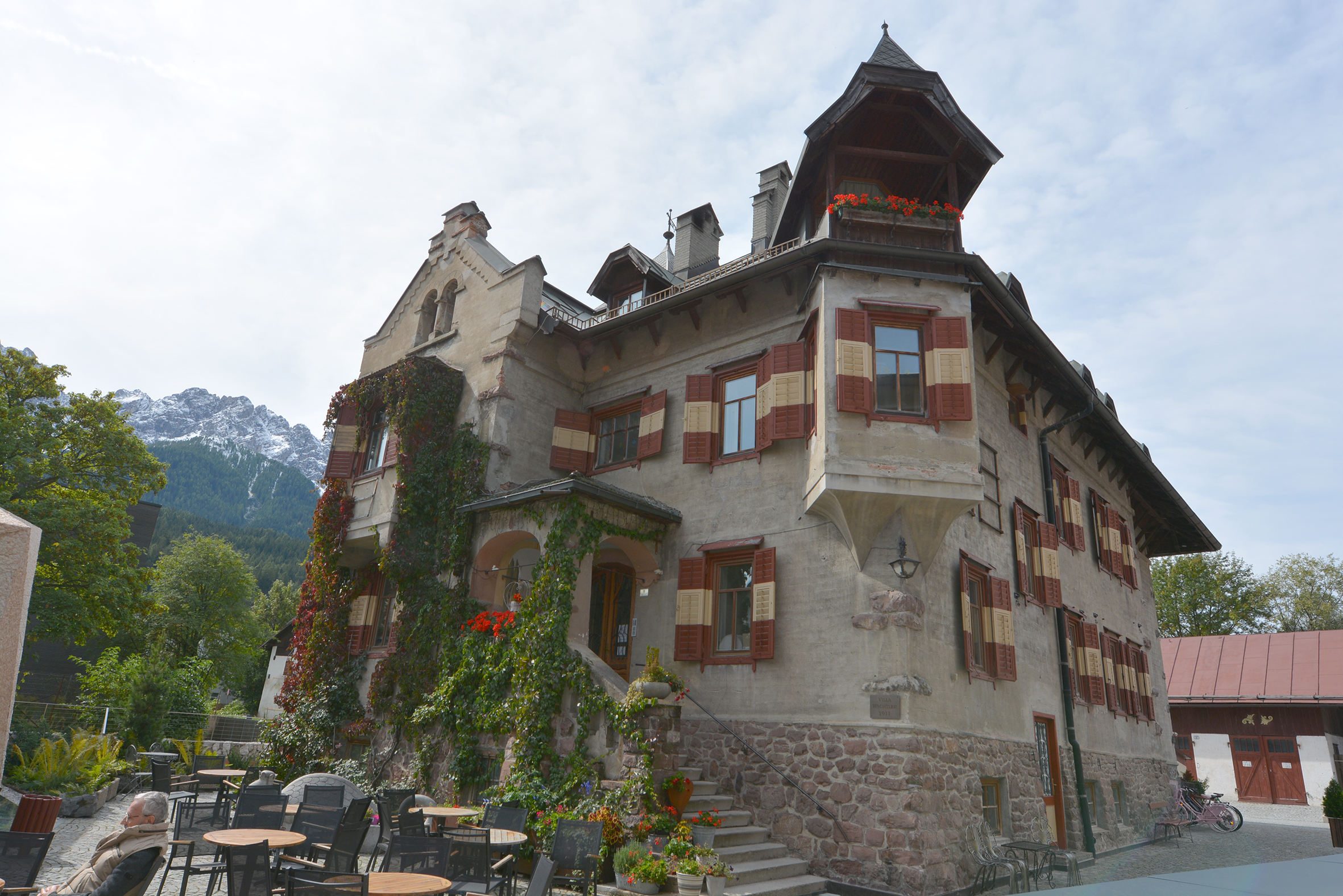 Villa Wachtler in Innichen